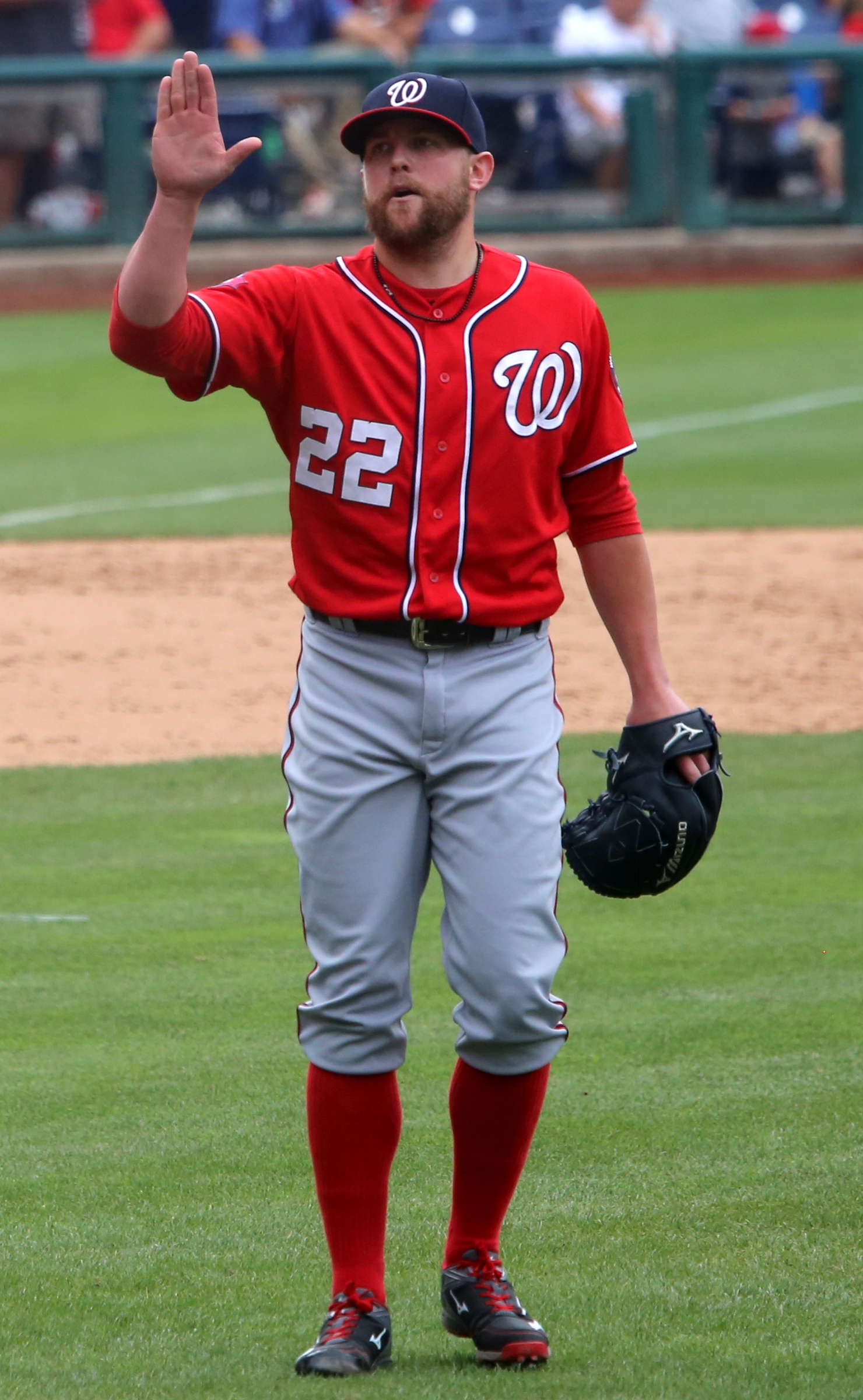 Drew Storen